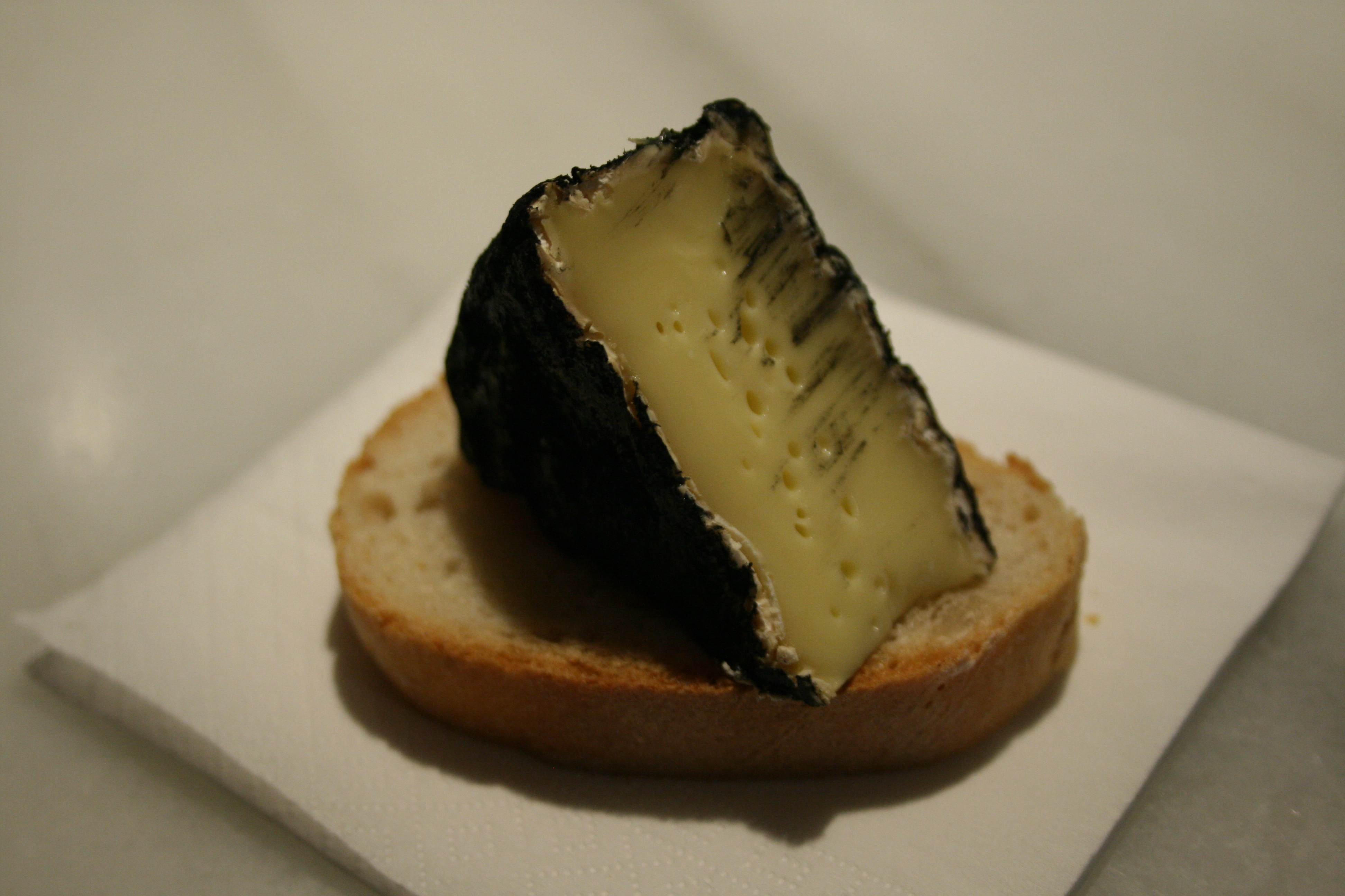 Olivet cendre